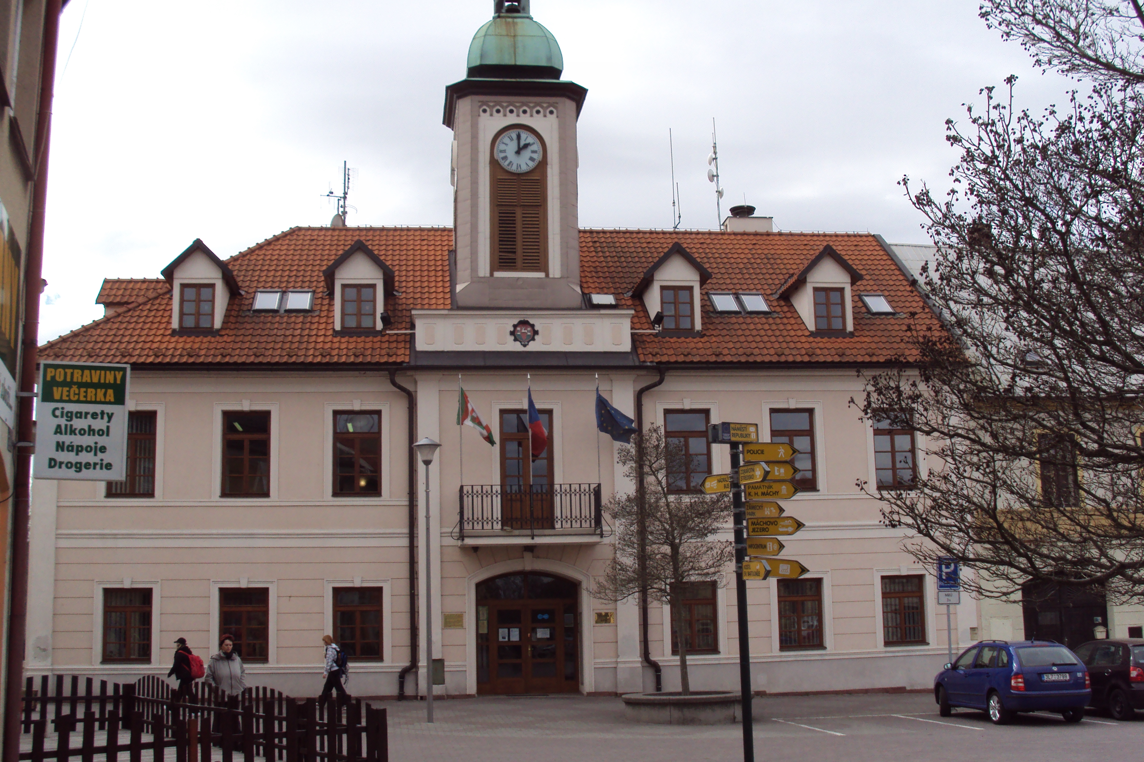 Radnice města Doksy na náměstí Republiky